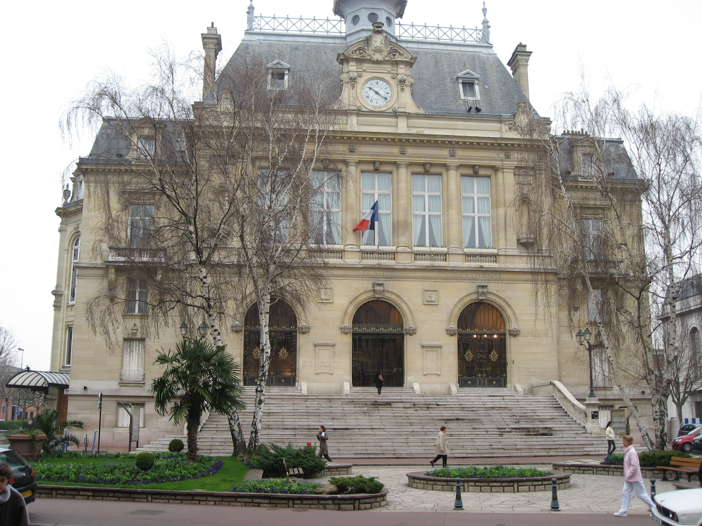 Mairie d'Asnières-sur-Seine Map: 48° 54' 39" N 2° 17' 20" E